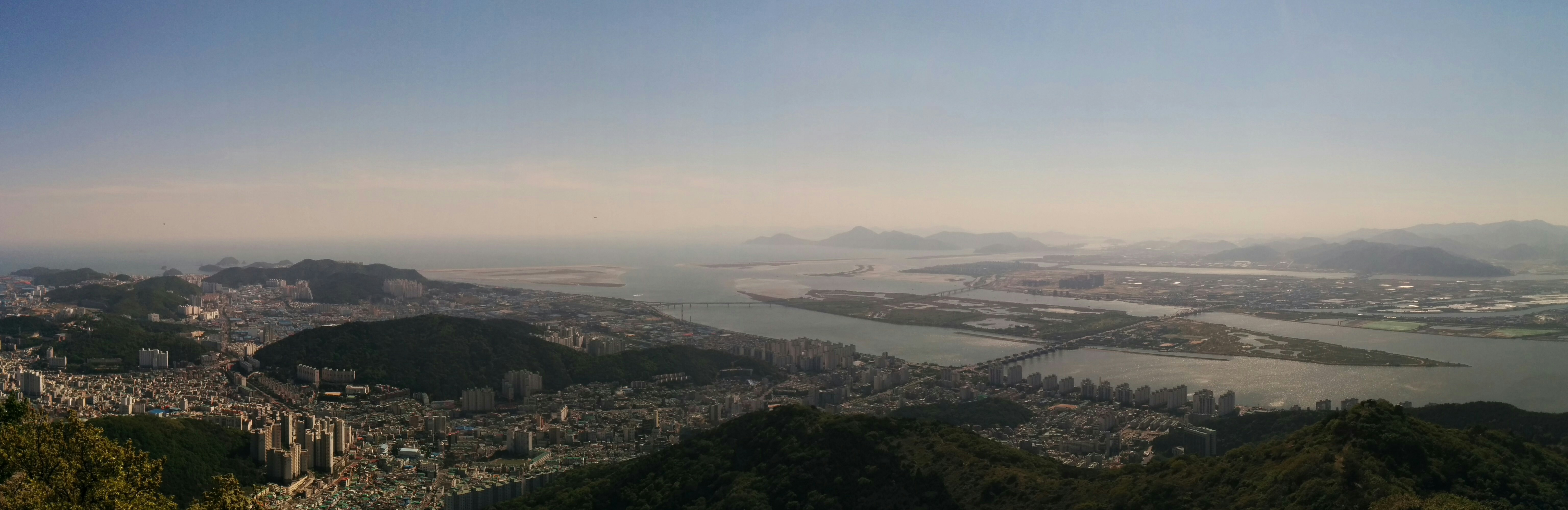 승학산에서 바라본 사하구 전경